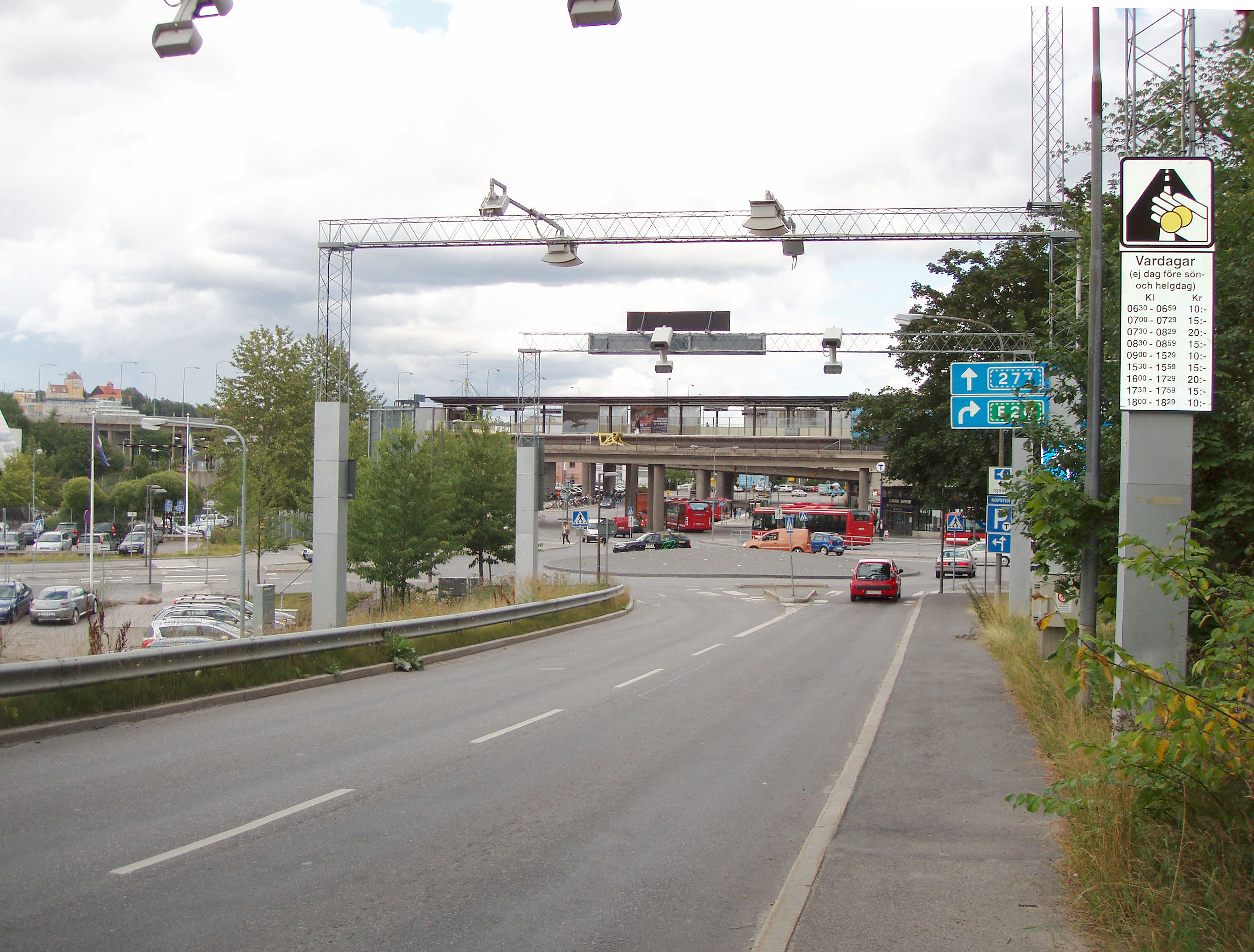 Ropstensplan vid Ropsten, norr om Lidingöbroarnas landfästen. Stora rondellen mitt i bild. Vy från Gasverksvägen med en av de automatiska betalstationerna för trängselskatt i förgrunden. Till vänster vid horisonten skymtar hotell Foresta på Herserudsklippan på Lidingö.